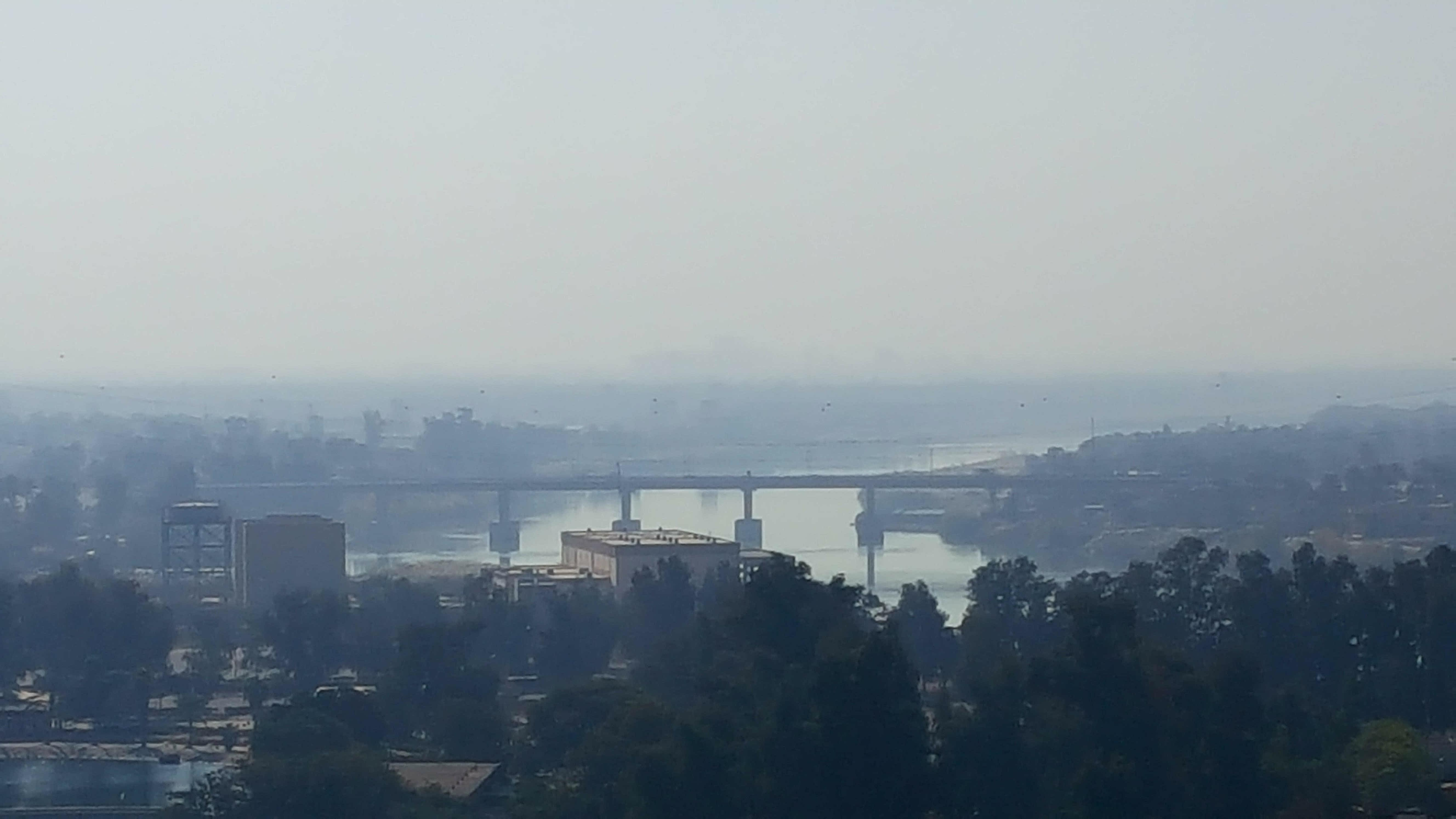 جسر المثنى على نهر دجلة شمال مدينة بغداد، العراق.